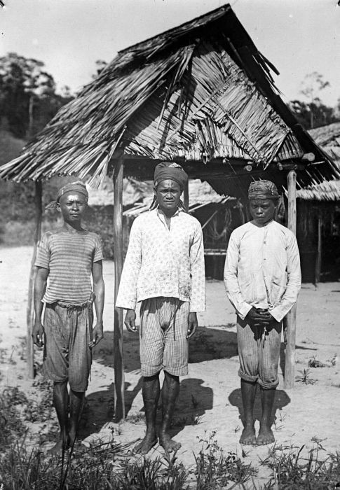 Repronegatief. Drie mannen van de Wal Pangat stam staan voor een offerhuisje, Noord-Boeroe